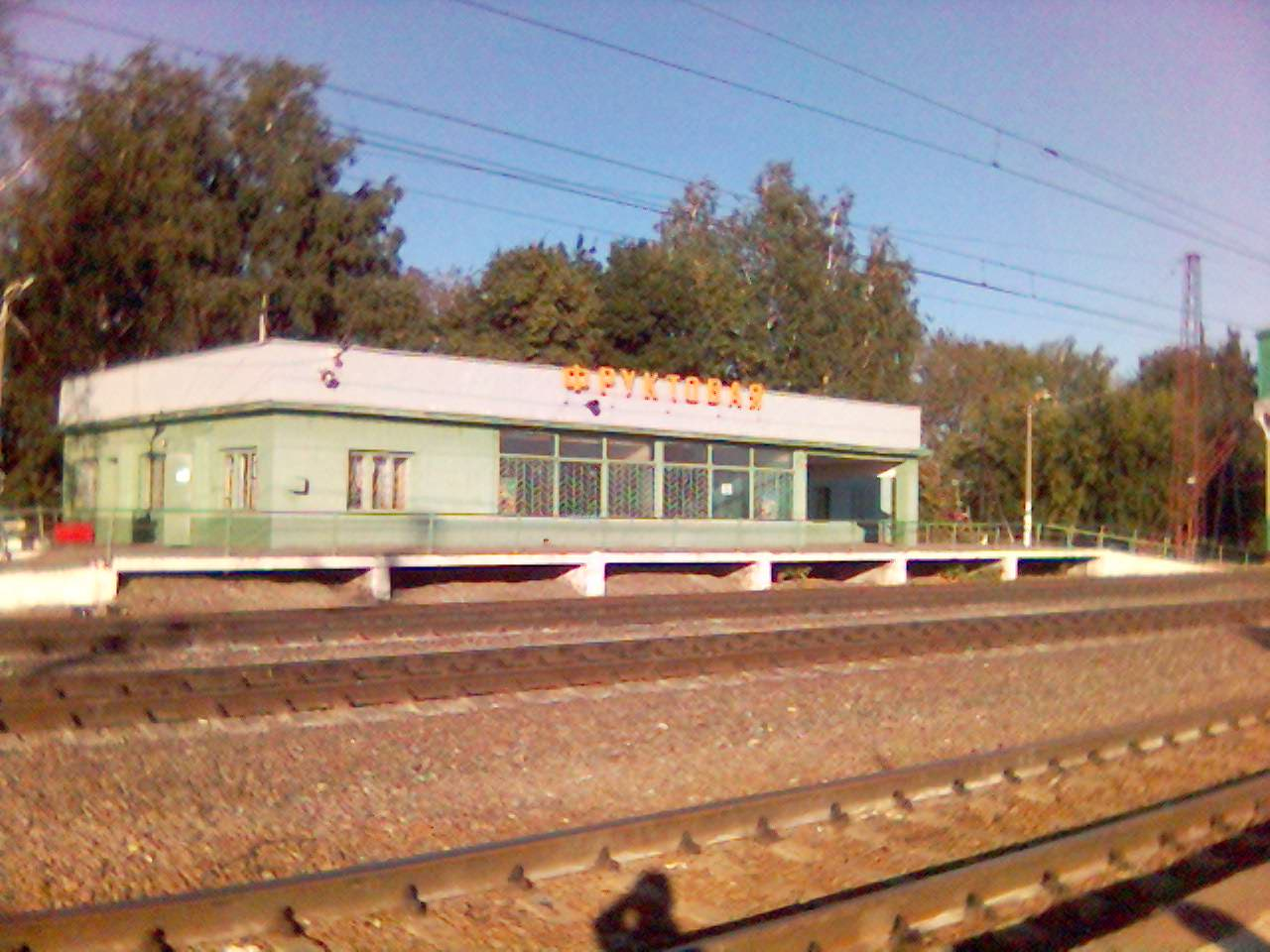 Станция Фруктовая, Московская область, Луховицкий район. Вокзал.